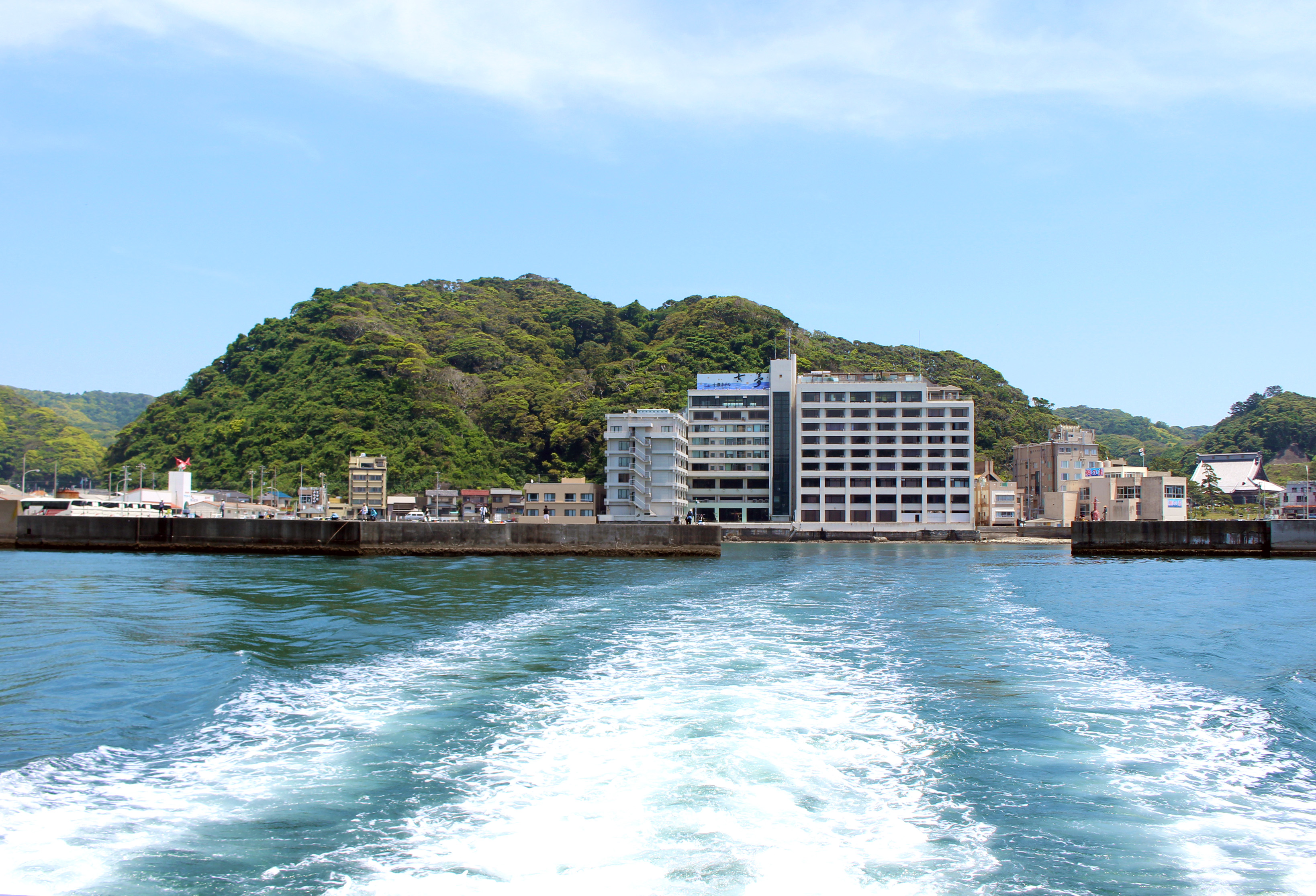 鯛の浦観光遊覧船より小湊漁港方面（内浦湾）を望む